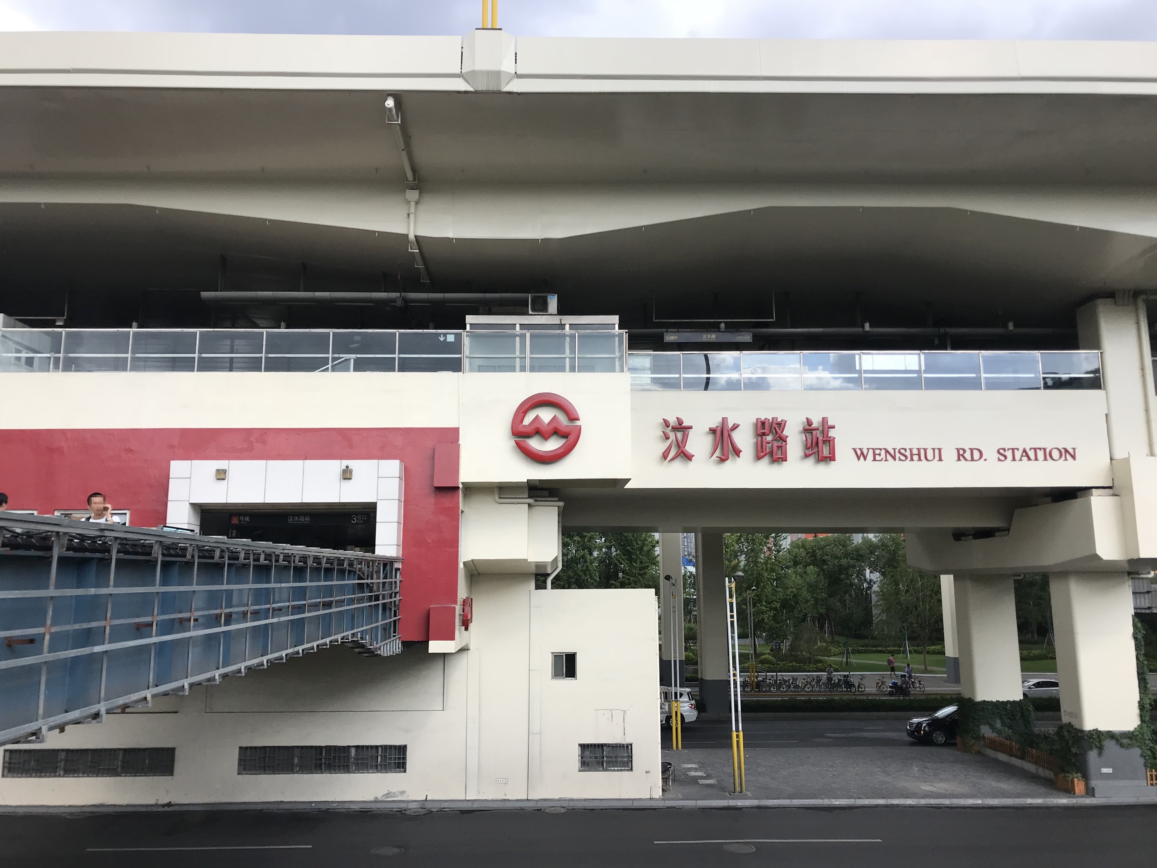 汶水路駅の駅舎